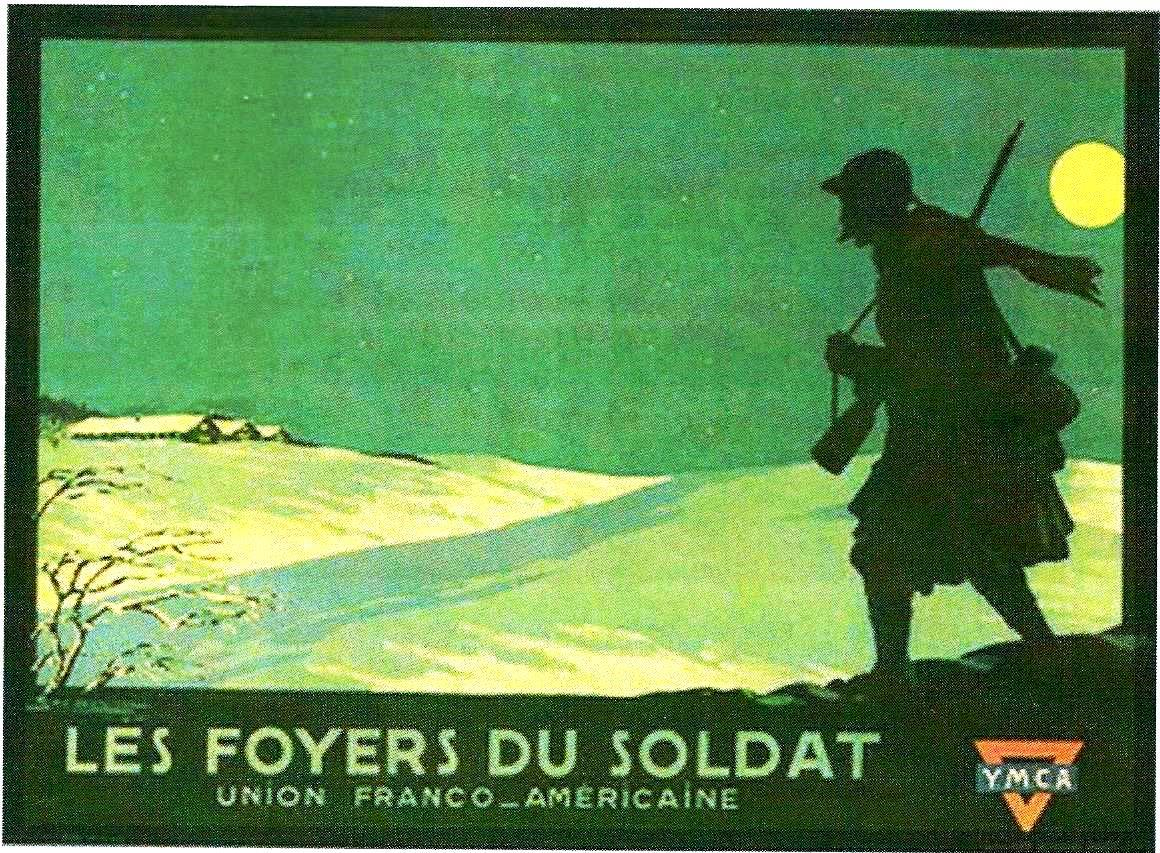 Affiche de soutient aux Foyers du Soldat de l'YMCA (1917)